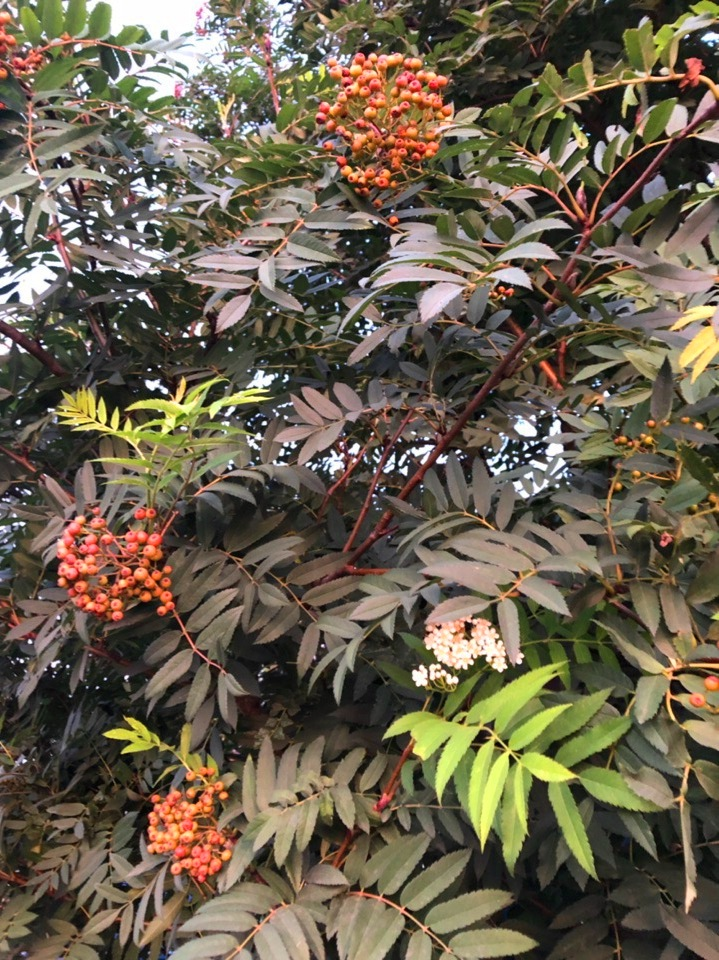 Rowan Sorbus aucuparia with flowers and fruit in Siberia